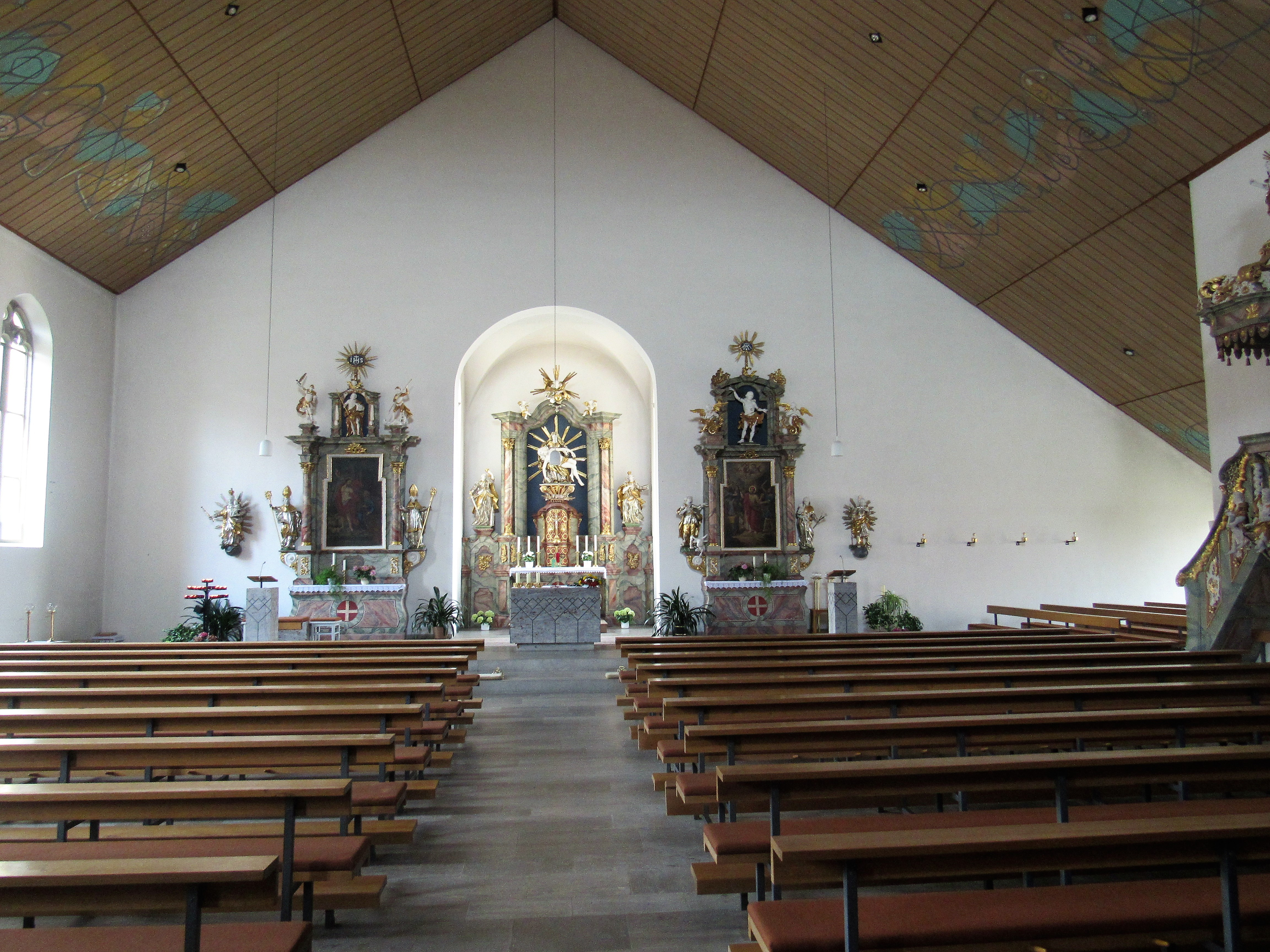 Langhaus mit neuem Chor